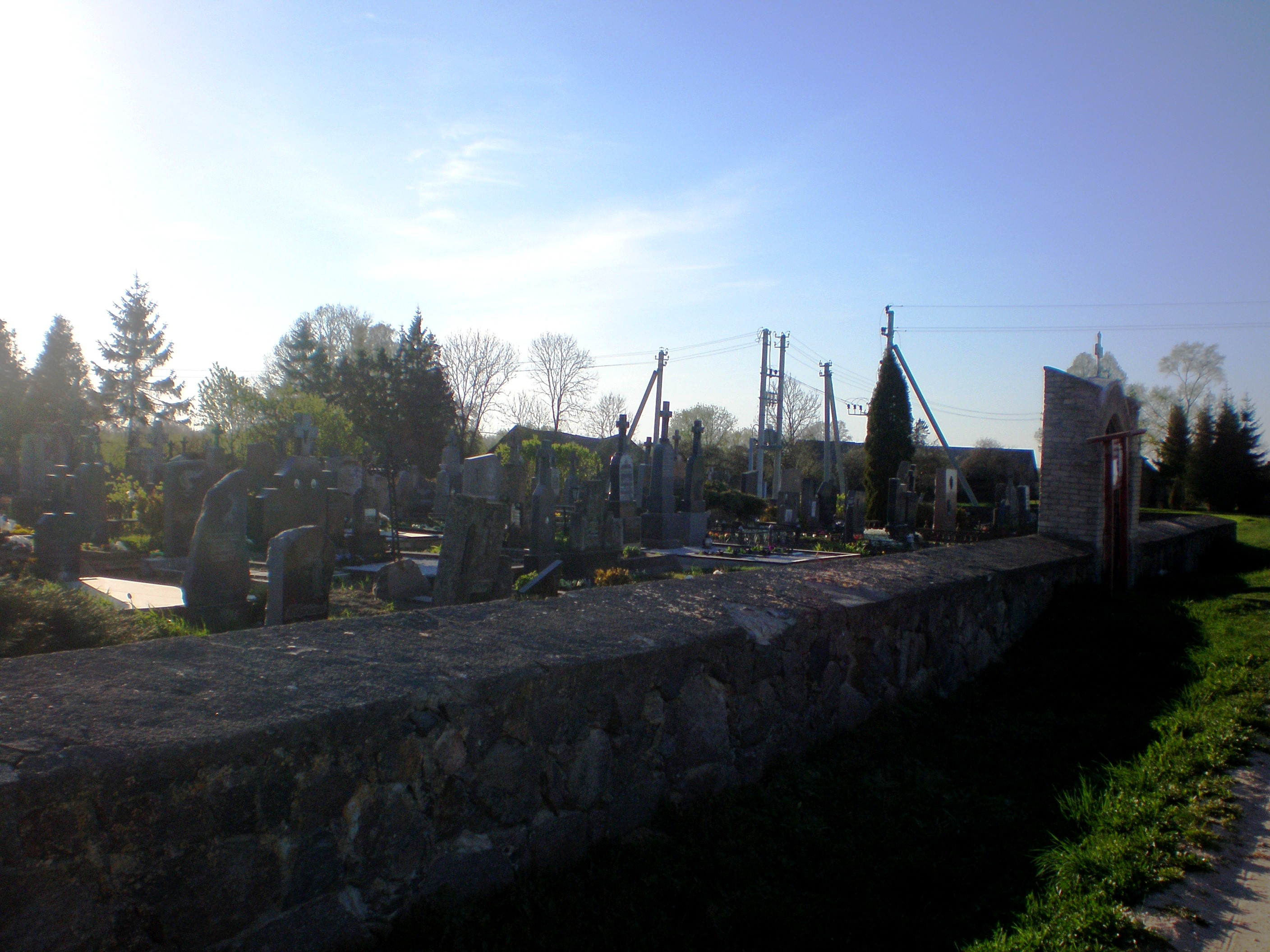 Vailainių kapinės, Krakių sen., Kėdainių raj.